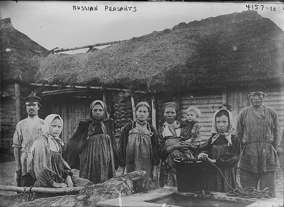 Campesinos rusos en fecha desconocida.